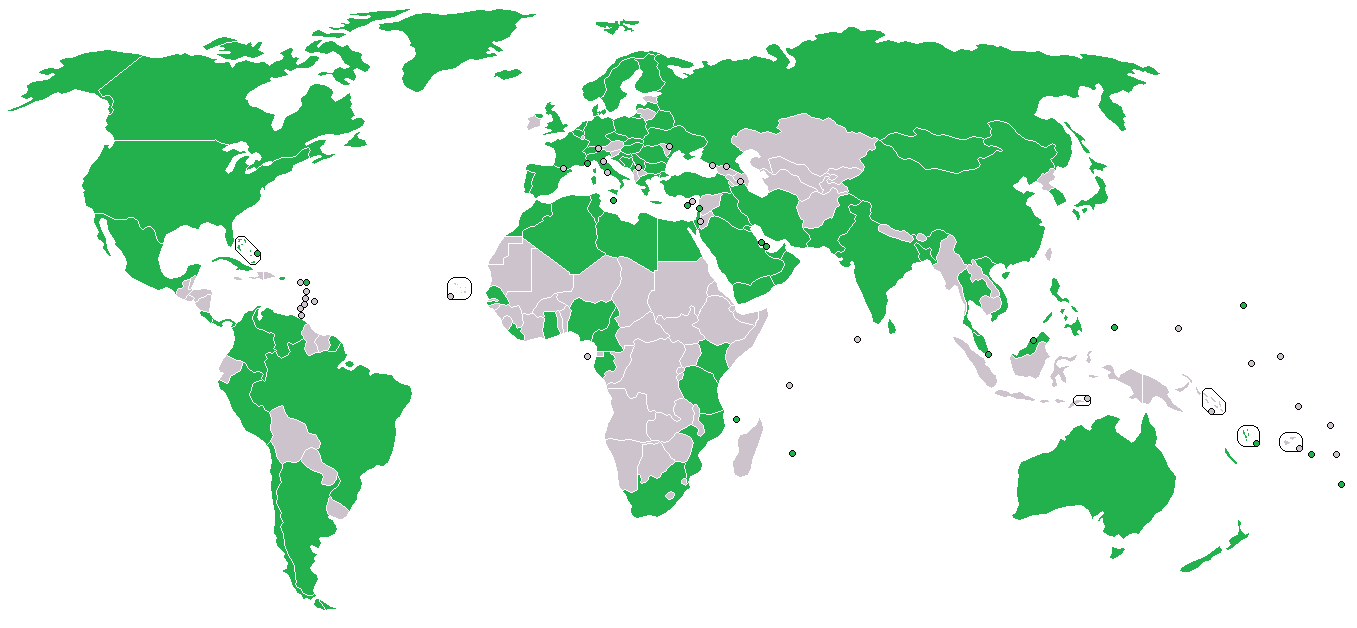 Países membros da International Mobile Satellite Organization